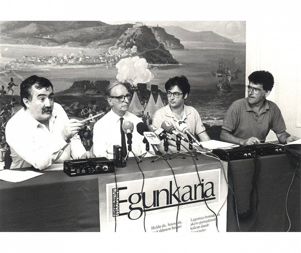 ‘Egunkaria’ aurkezteko agerraldia, 1990ean: Joxemi Zumalabe, Martin Ugalde, Iñaki Uria eta Joan Mari Torrealdai.